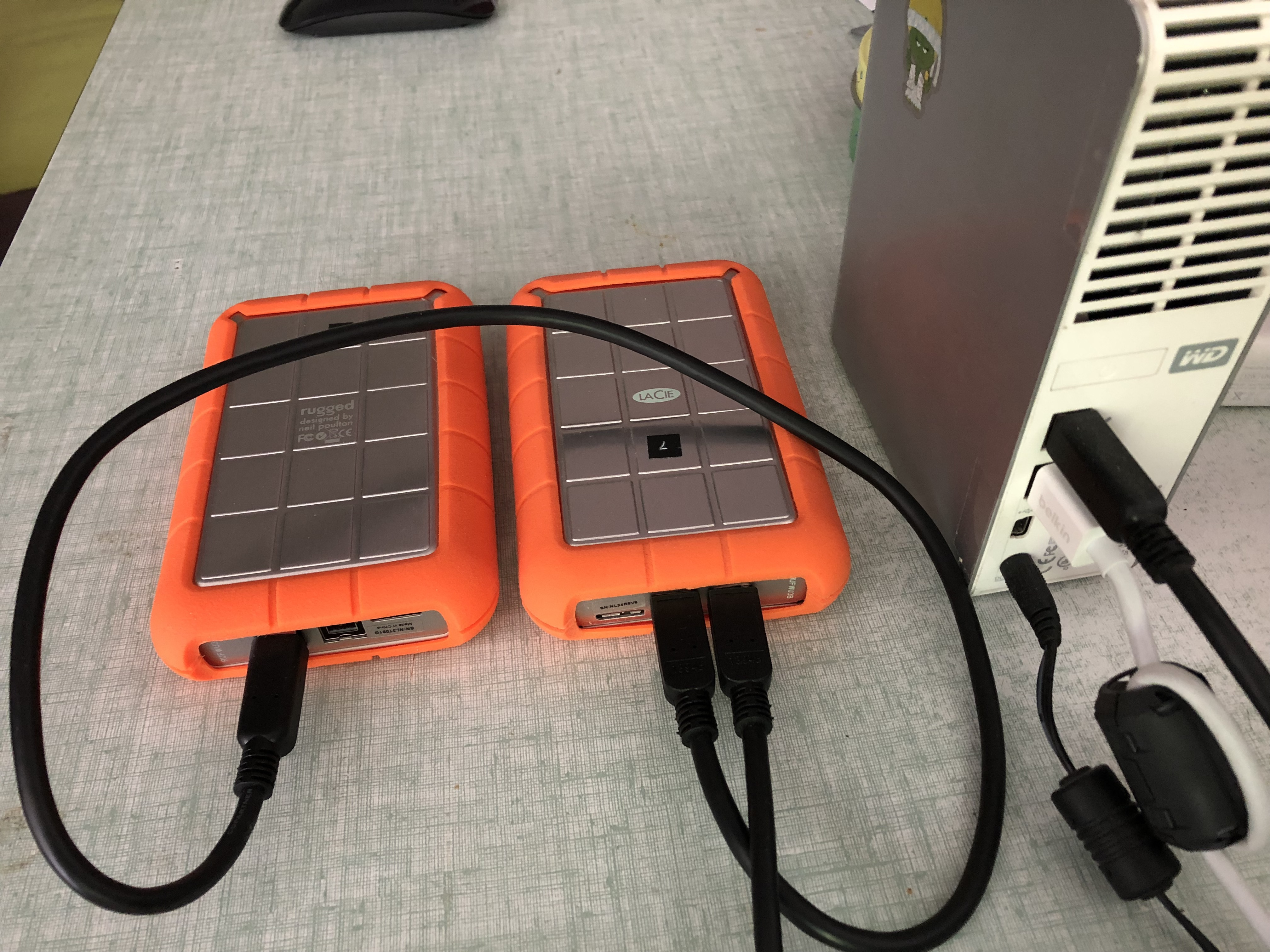 Exemple de "chaînage" de disque dur en FireWire 800 ou disque dur en chaine. ici 3 disque dur sur une entrer ou câble